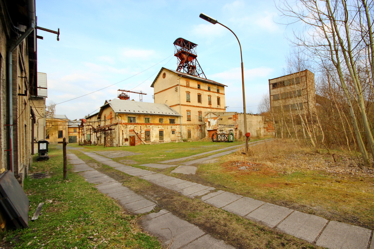 Hornický skanzen Mayrau